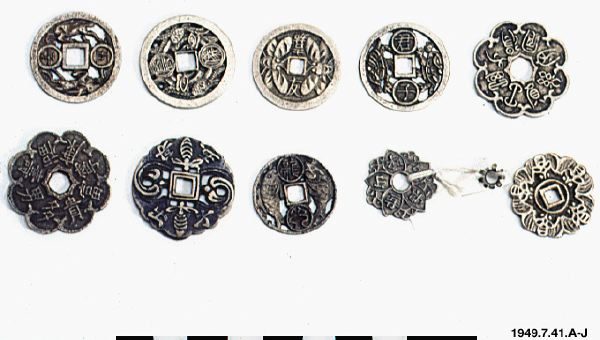 1949.07.0041 En serie av myntformade amuletter (enligt kataloguppgift) av varierande form och dekor, bl a i form av motställda fiskar, insekter etc. Ofta förekommer arkaiskt formade karaktärer. Enligt katalogen är dekoren i form av lyckosymboler. Det är möjligtvis snarare t ex djur som är kända för att motverka det onda, t ex är det vanligt i speciellt Kina att insektsmotiv används som ett sätt att hålla det otäcka borta. (PH) Japan